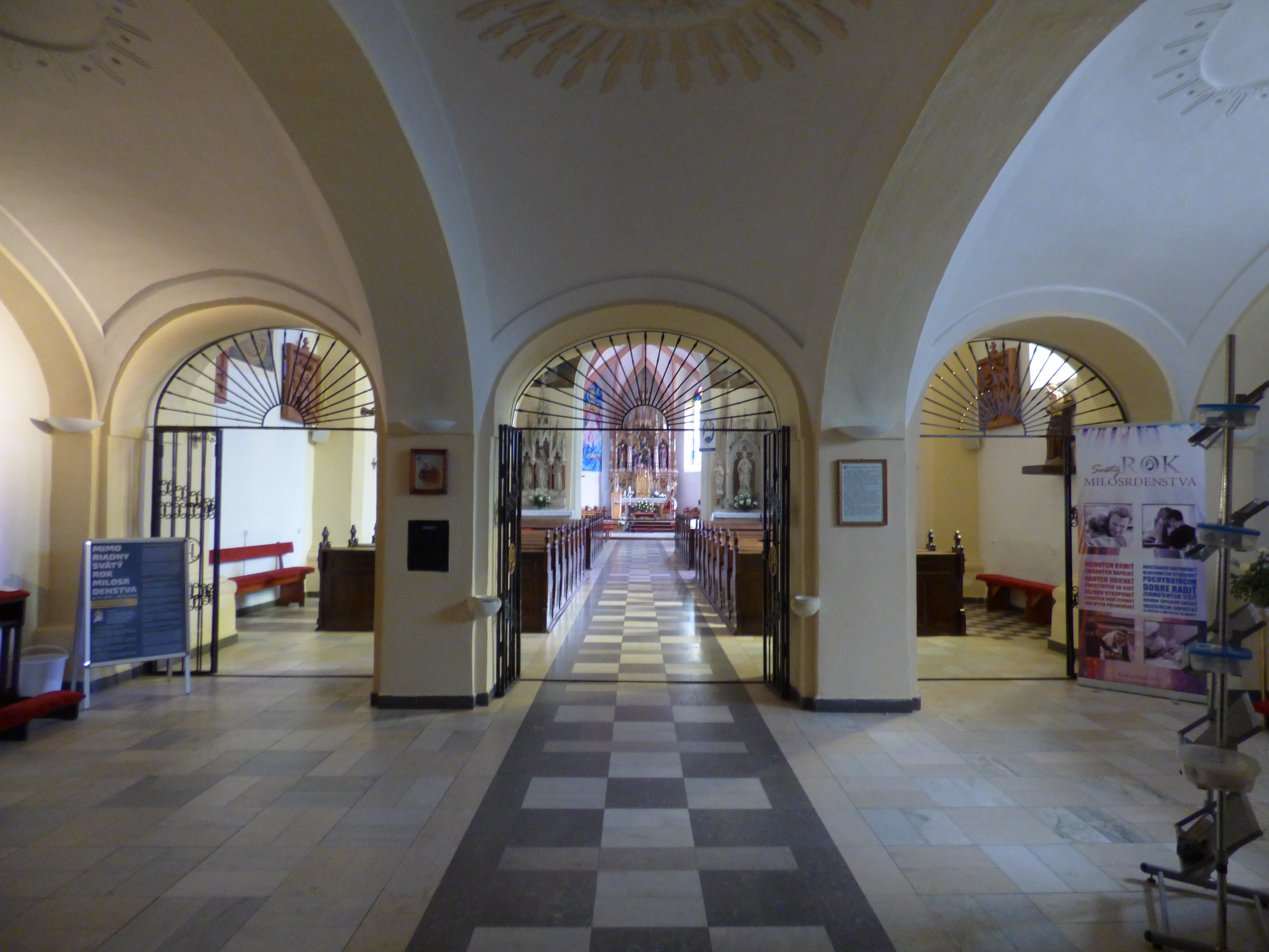 Interiér kostola